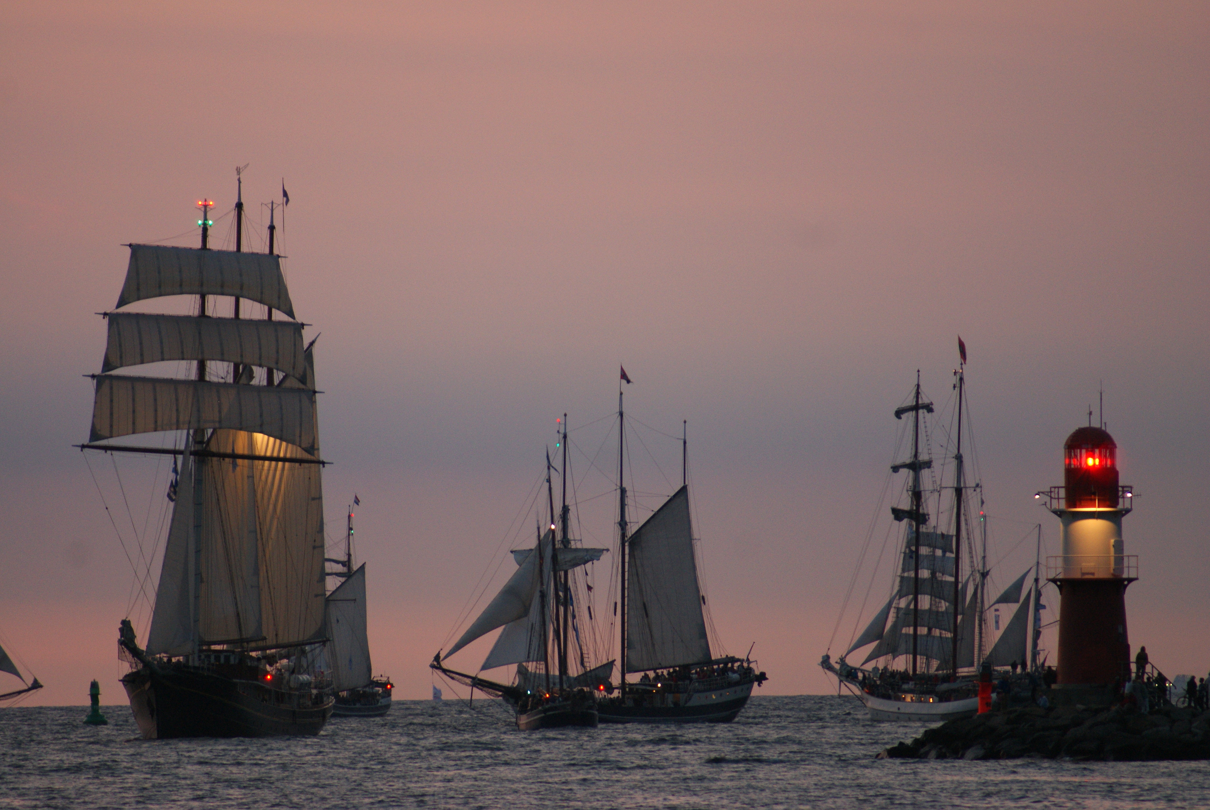 Sehr sehenswert ist die Rückkehr der Windjammer in den Hafen.